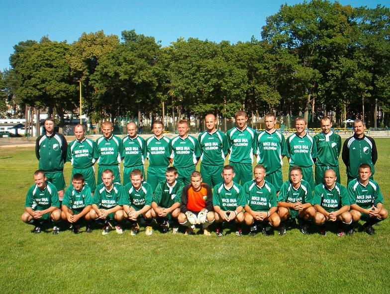 Zdjęcie piłkarzy - MKS Ina Goleniów